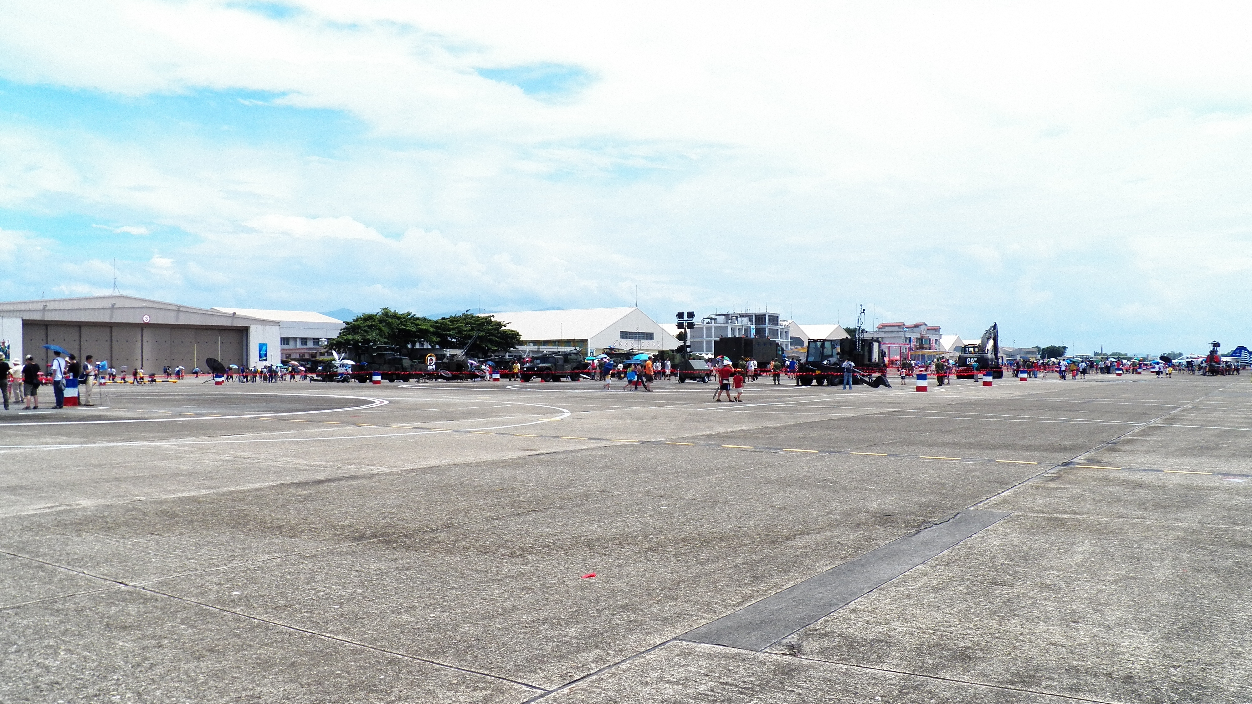 2012年空軍嘉義基地營區開放活動，由停機坪開放區域西北角東南望活動會場遠景。